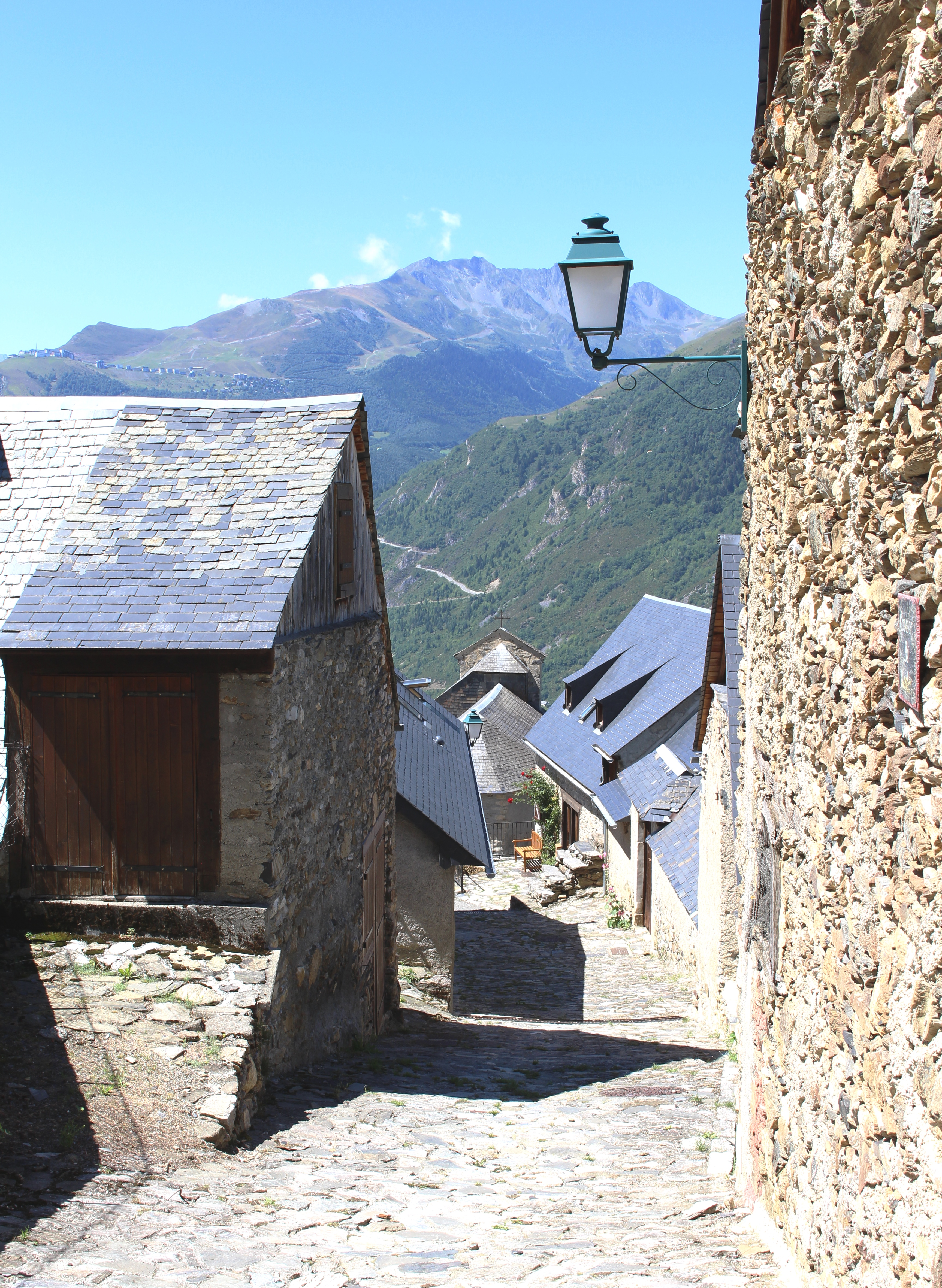 Rue du village de Grailhen (Hautes-Pyrénées)